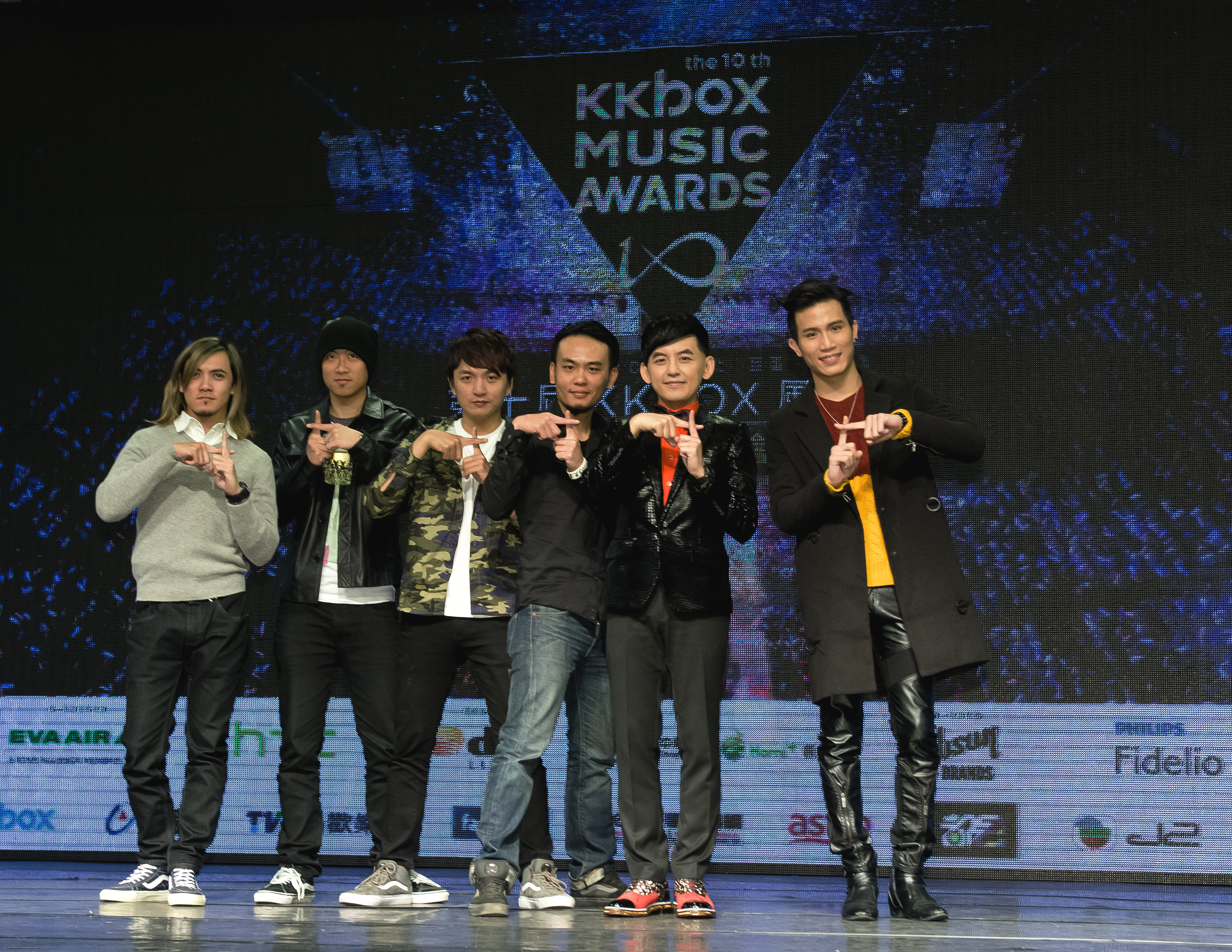 中文（台灣）: 第十屆KKBOX數位音樂風雲榜行前記者會。左起：滅火器樂團（左一至左四）、黃子佼、陳彥允。